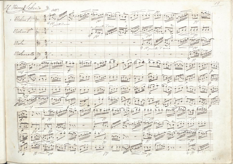 Autografo dello scherzo Il fiume di Teodulo Mabellini (1817-1897), conservato al Conservatorio di Firenze